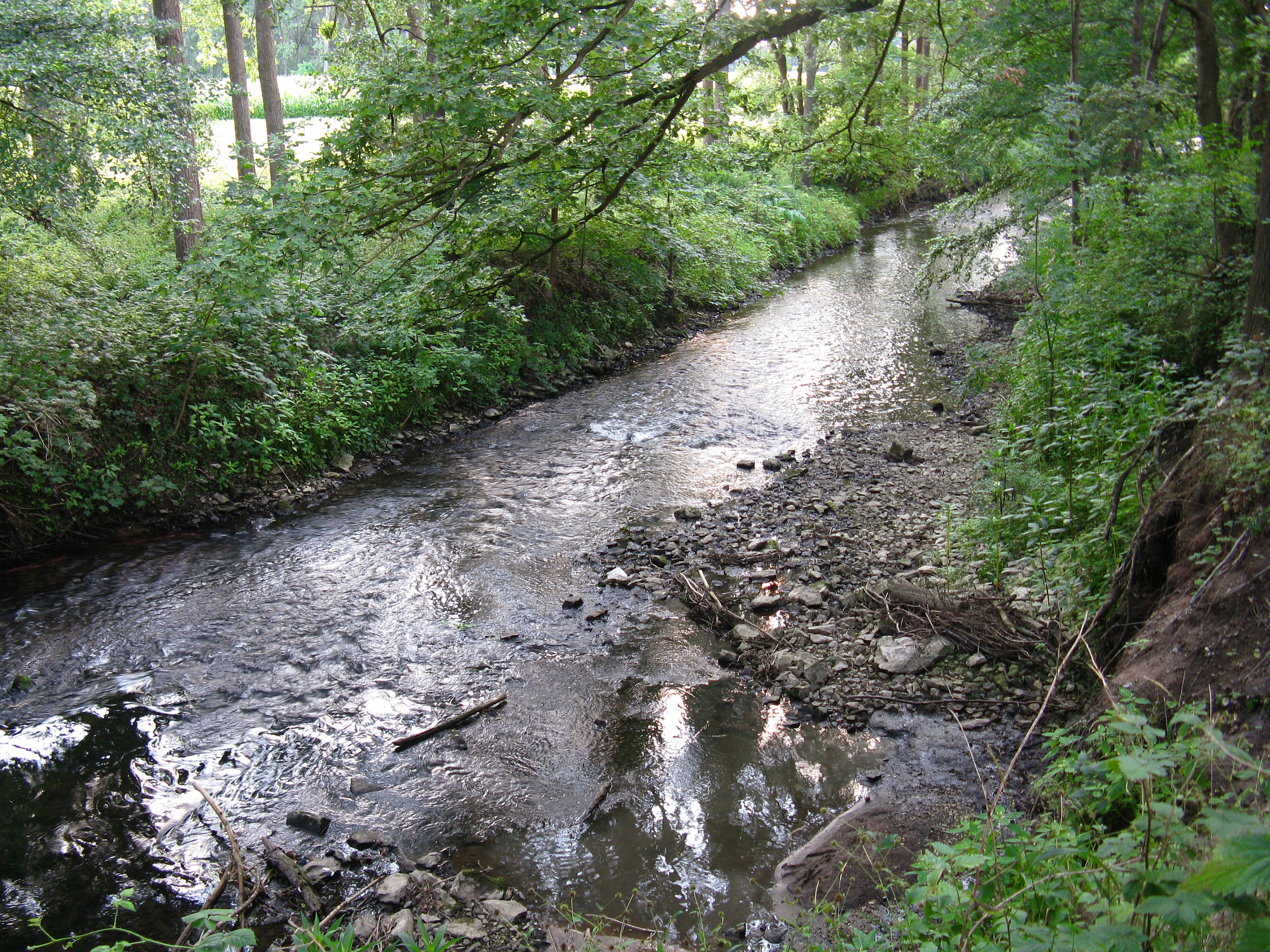 Die Werre im Naturschutzgebiet Holzhauser Bruch im Sommer. Sommertypisch herrscht Niedrigwasser.